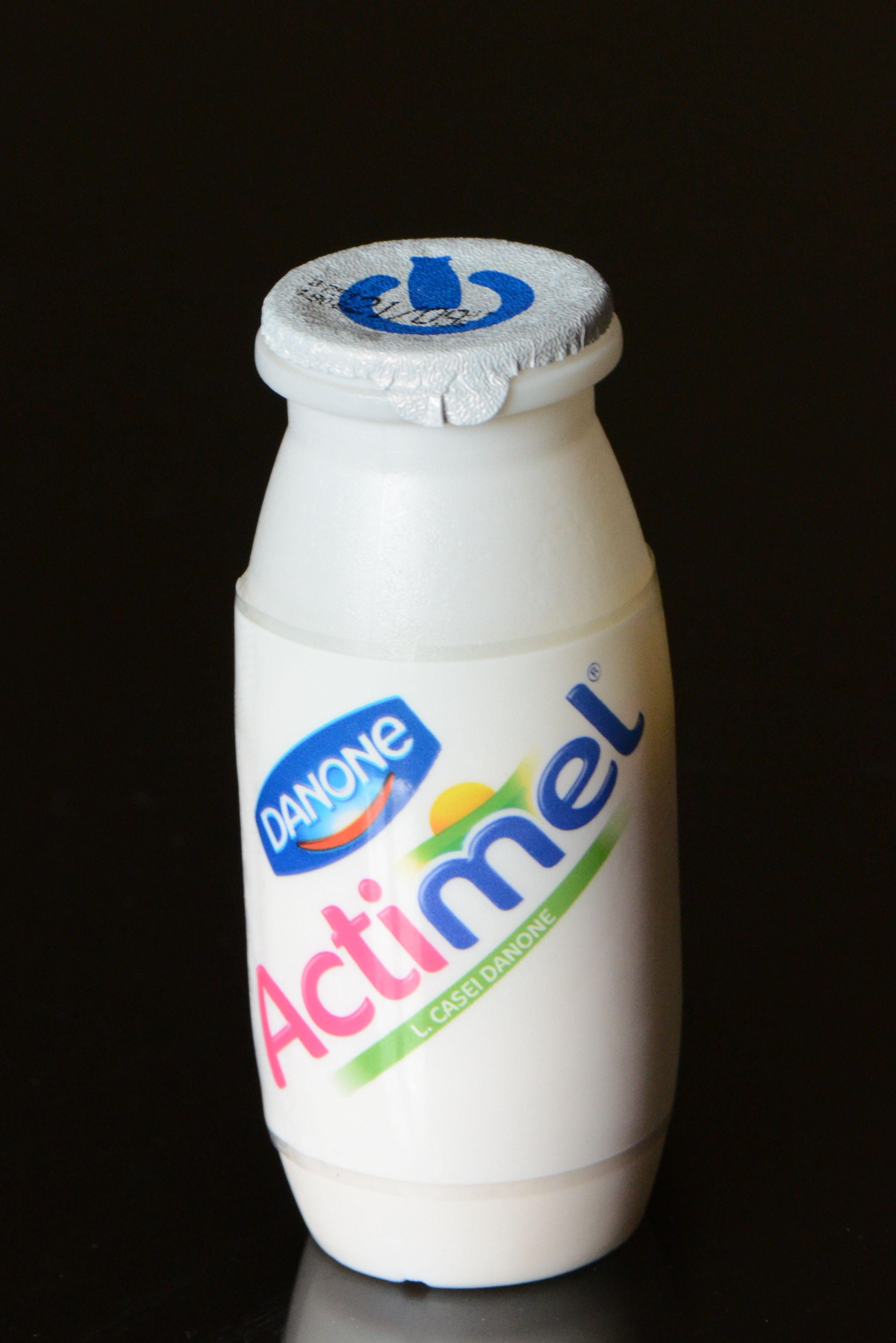 Actimel de Danone, lait fermenté probiotique